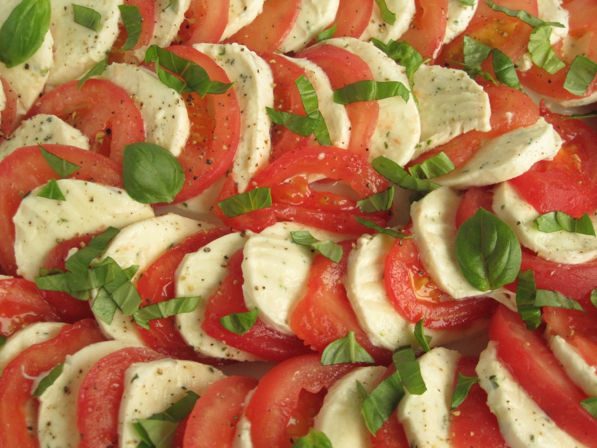 Salat aus Tomatenscheiben und Mozzarellascheiben, verziert mit Basilikum